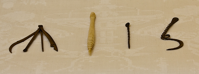 Gedekte tafel (Toegepaste kunst en Design, zaal 43) Noordelijke Nederlanden Vier tandenstokers (in combinatie met oorlepeltjes), 1500-1550 Geelkoper, been Schenking: collectie Van Beuningen-de Vriesse 1991 F7305, F7314, F7308 (KN&V) Northern Netherlands Four toothpicks (in combination with earspoons), 1500-1550 Brass, bone Donation: collection Van Beuningen-De Vriese 1991 F7305, F7314, F7308 (KN & V)